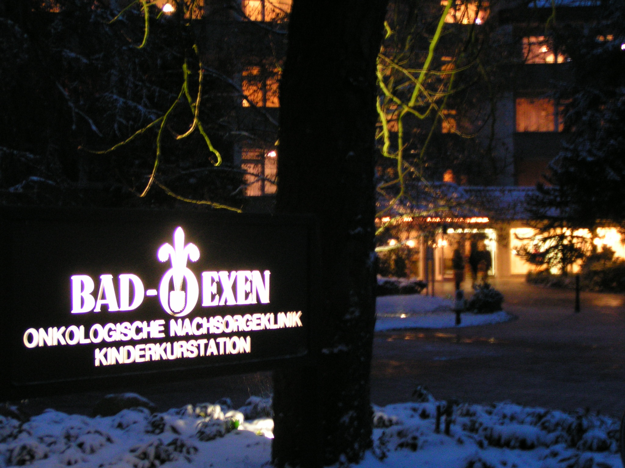 Kurklinik Bad Oexen: Eingangsbereich